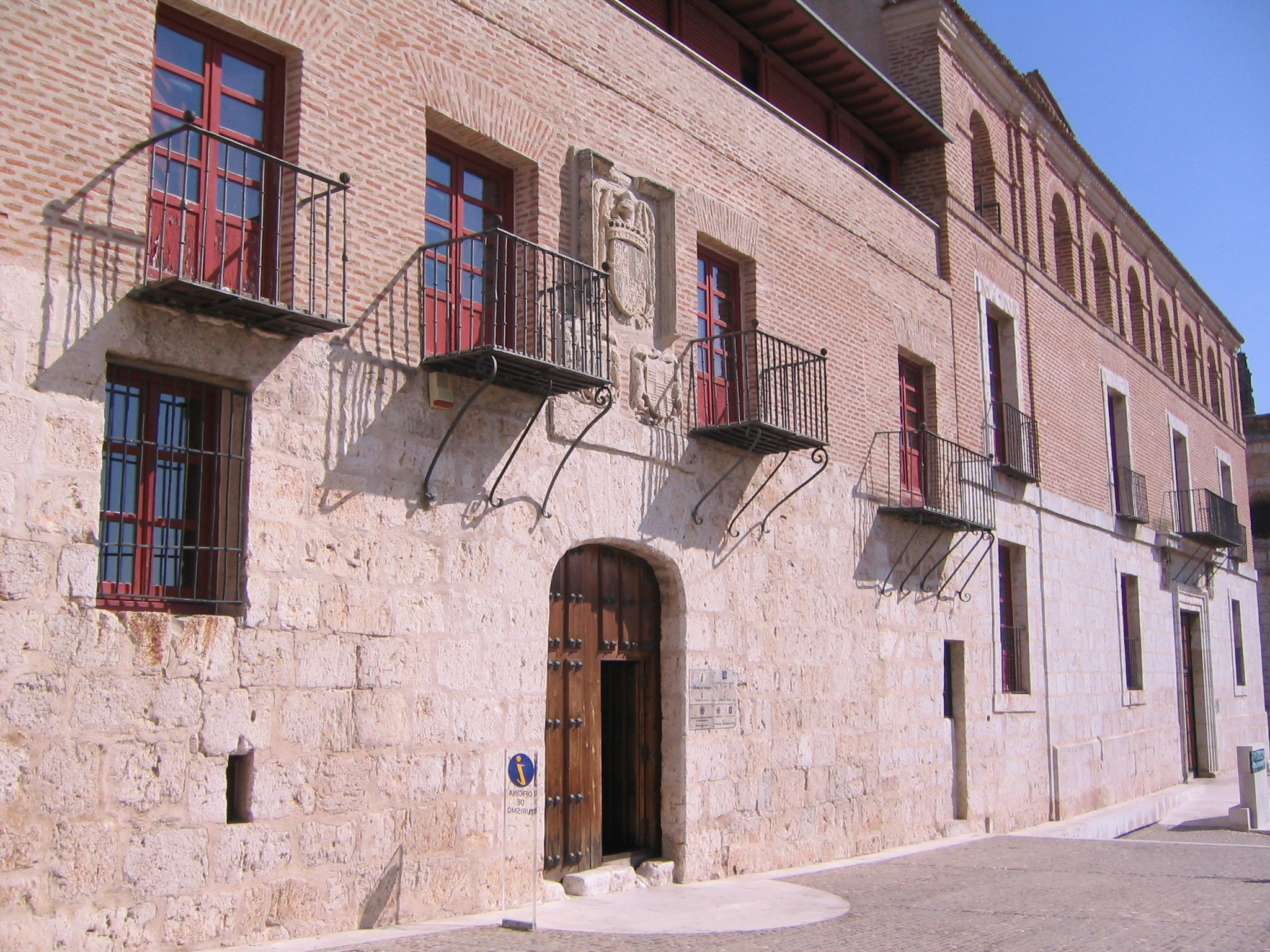 Casa del Tratado en Tordesillas (Valladolid) España.